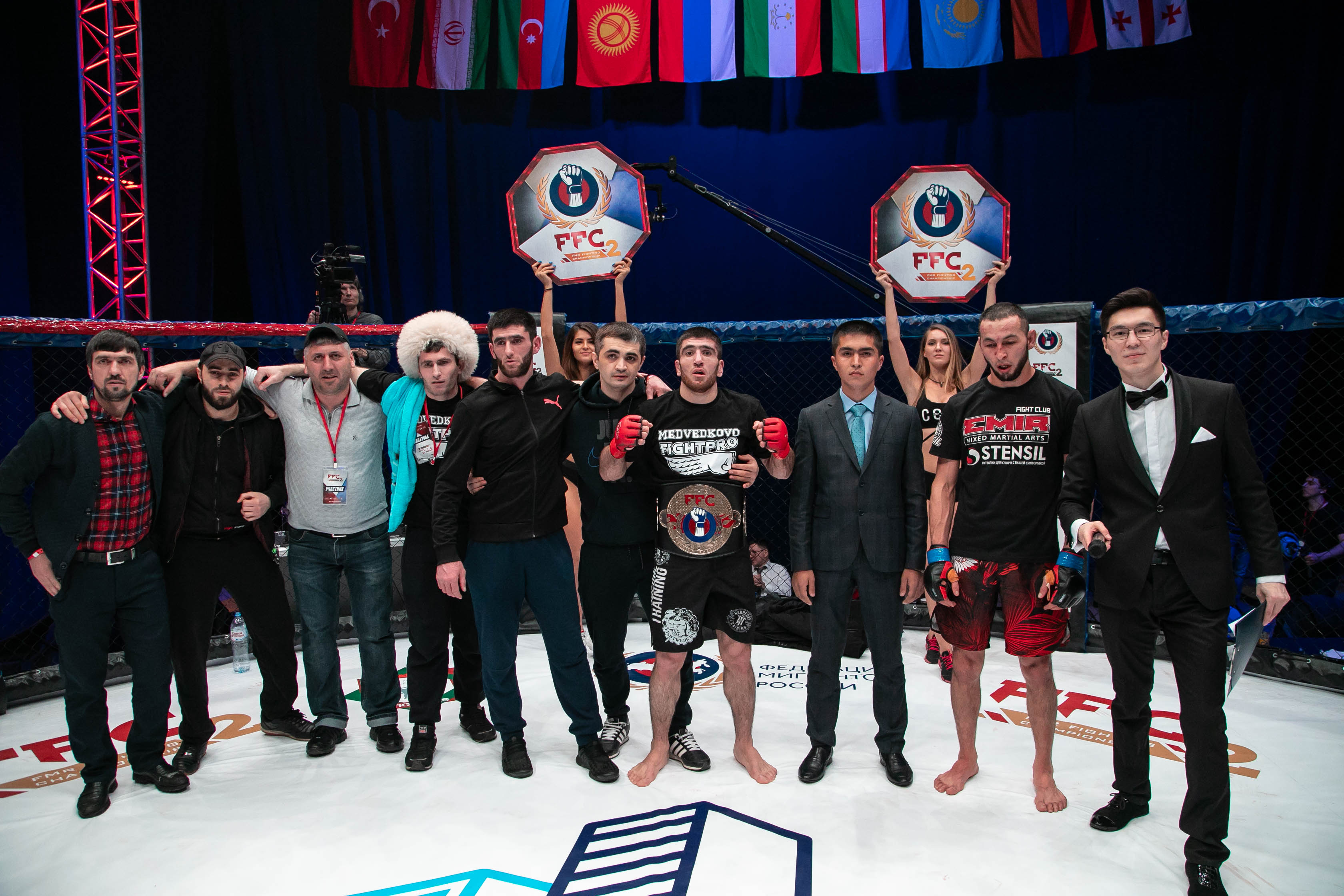 Чемпион FFC Курбан Зайнулабидов